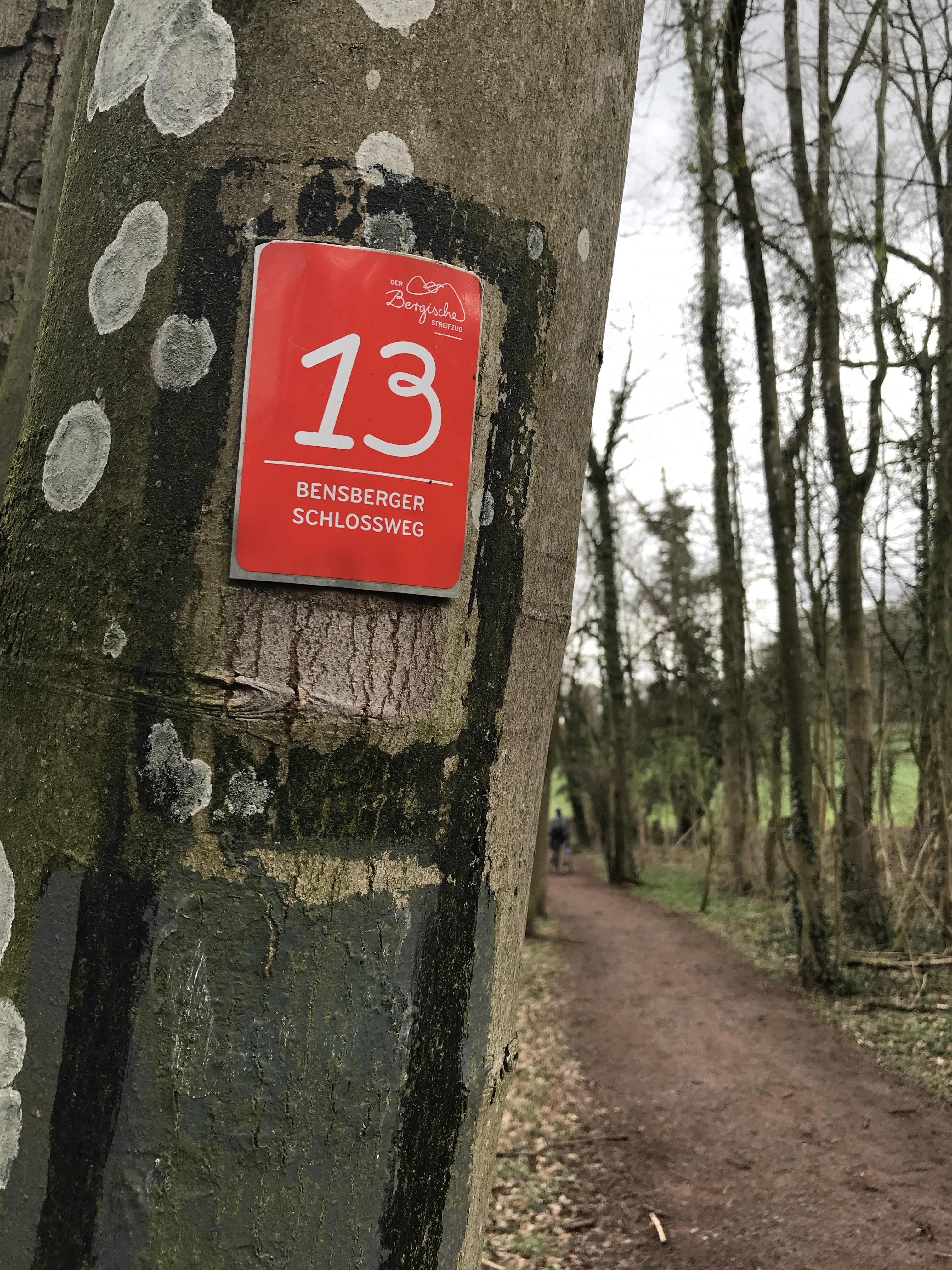 Bensberger Schlossweg, Bergische Streifzug Nr. 13